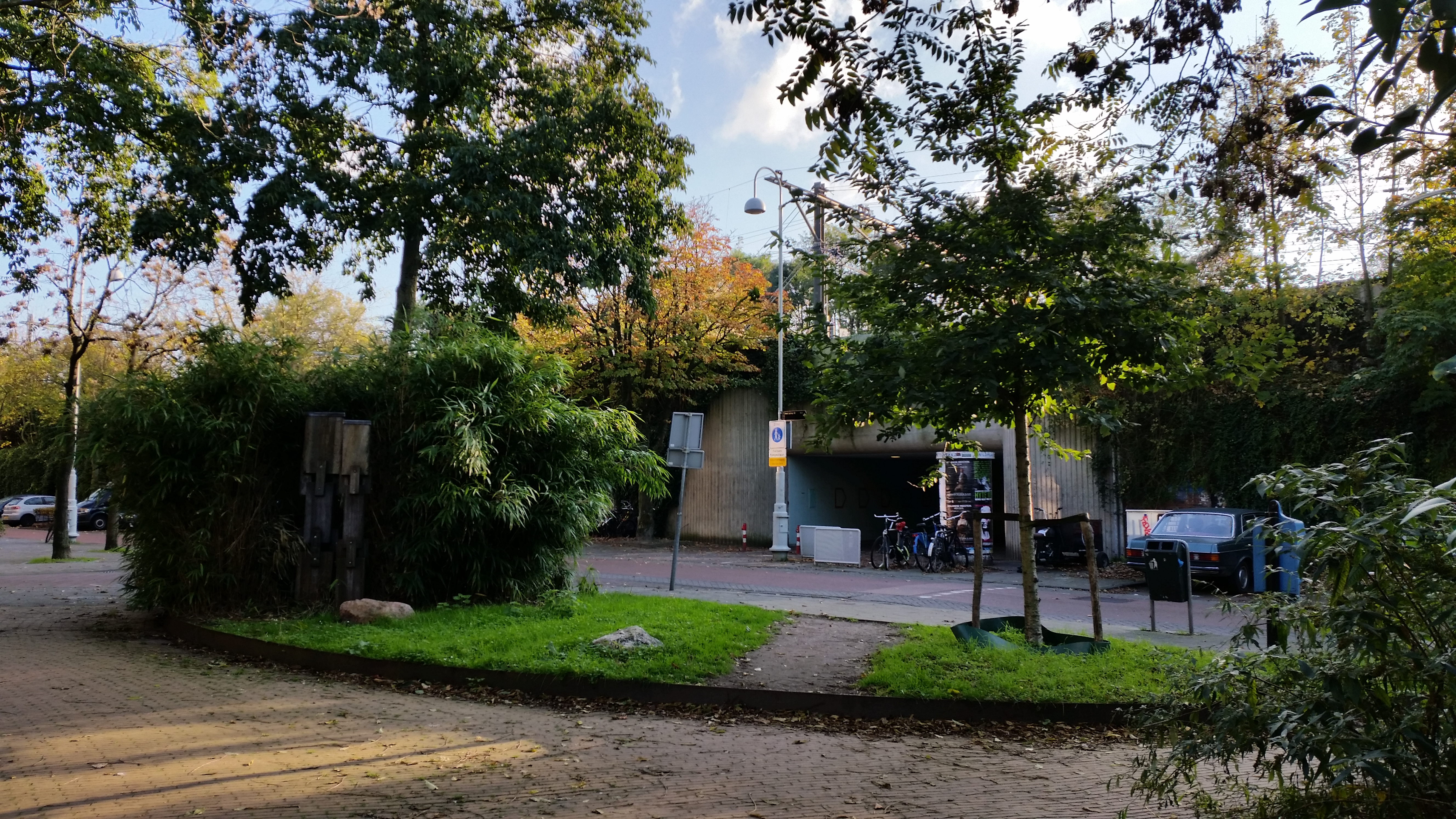 Titelloos kunstwerk van Jan Wolkers in het perkje voorafgaand aan het Jan Wolkerstuin, op de achtergrond de Zaandijkspoorbrug